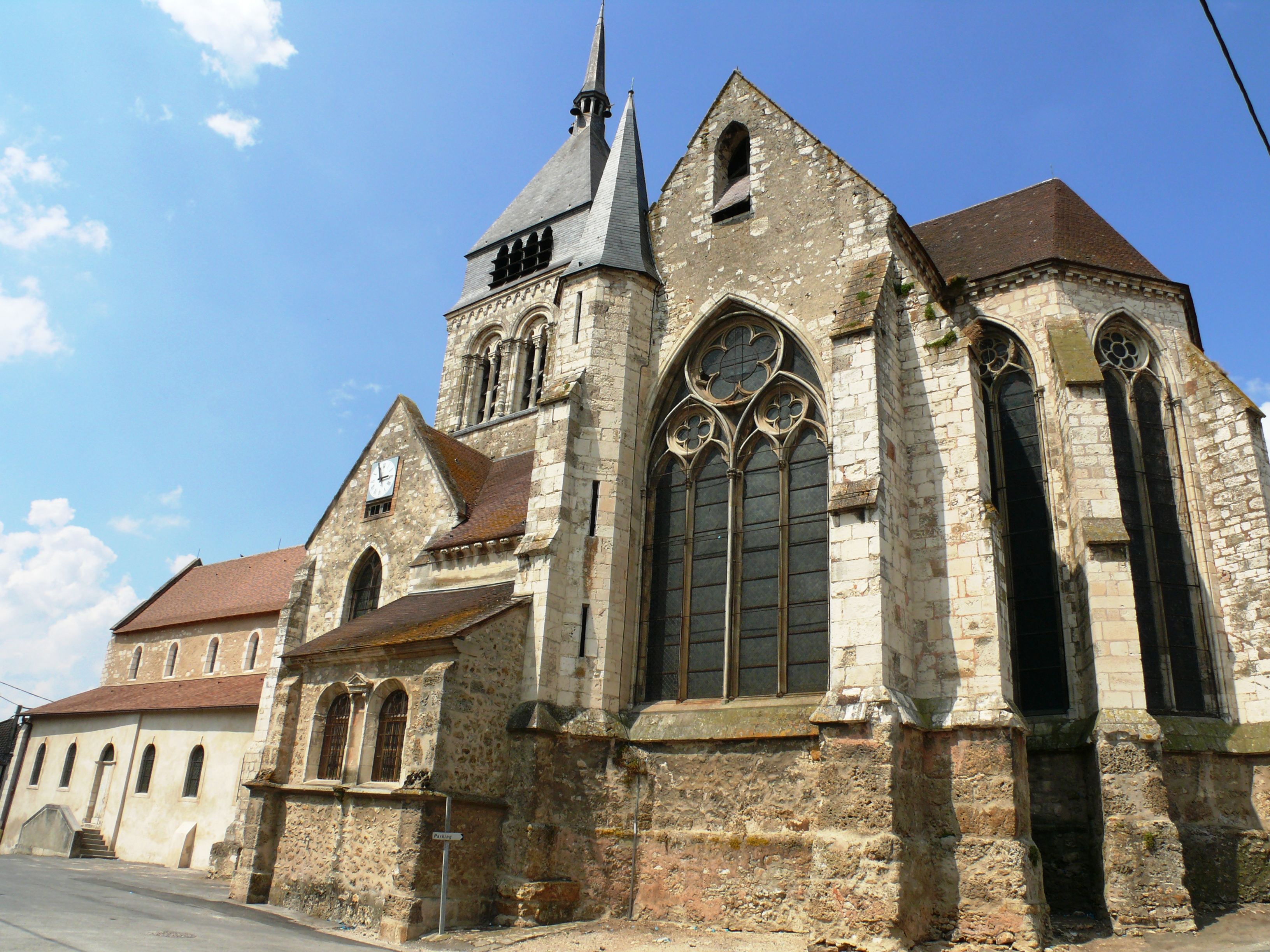 Damery - Eglise Saint-Georges